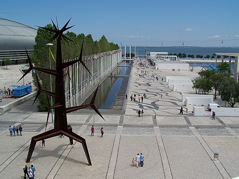 Panorâmica do Parque das Nações